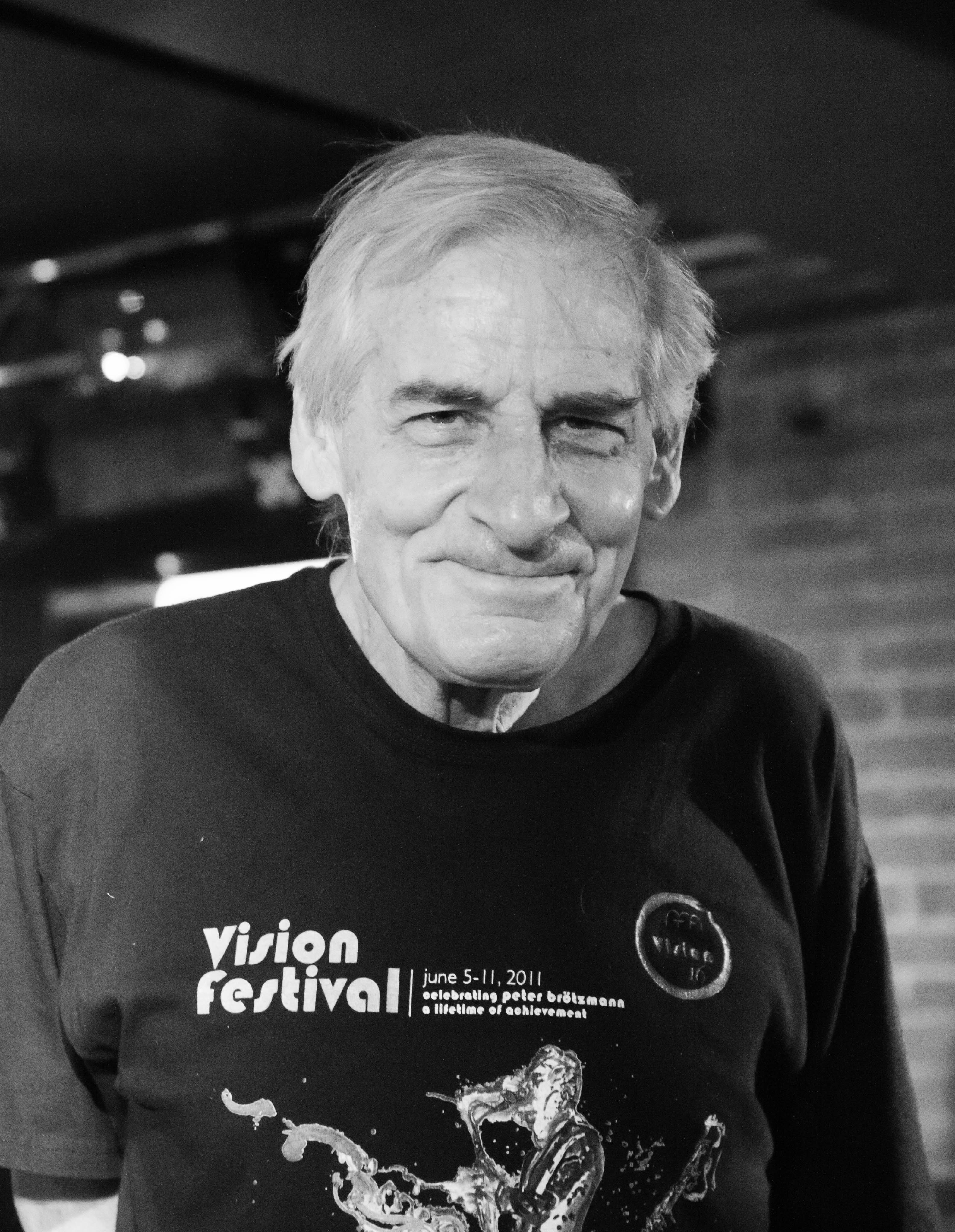 Концерт Бёртона Грина и группы Бром в клубе Алексея Козлова (Москва, ул. Маросейка дом 9/2)